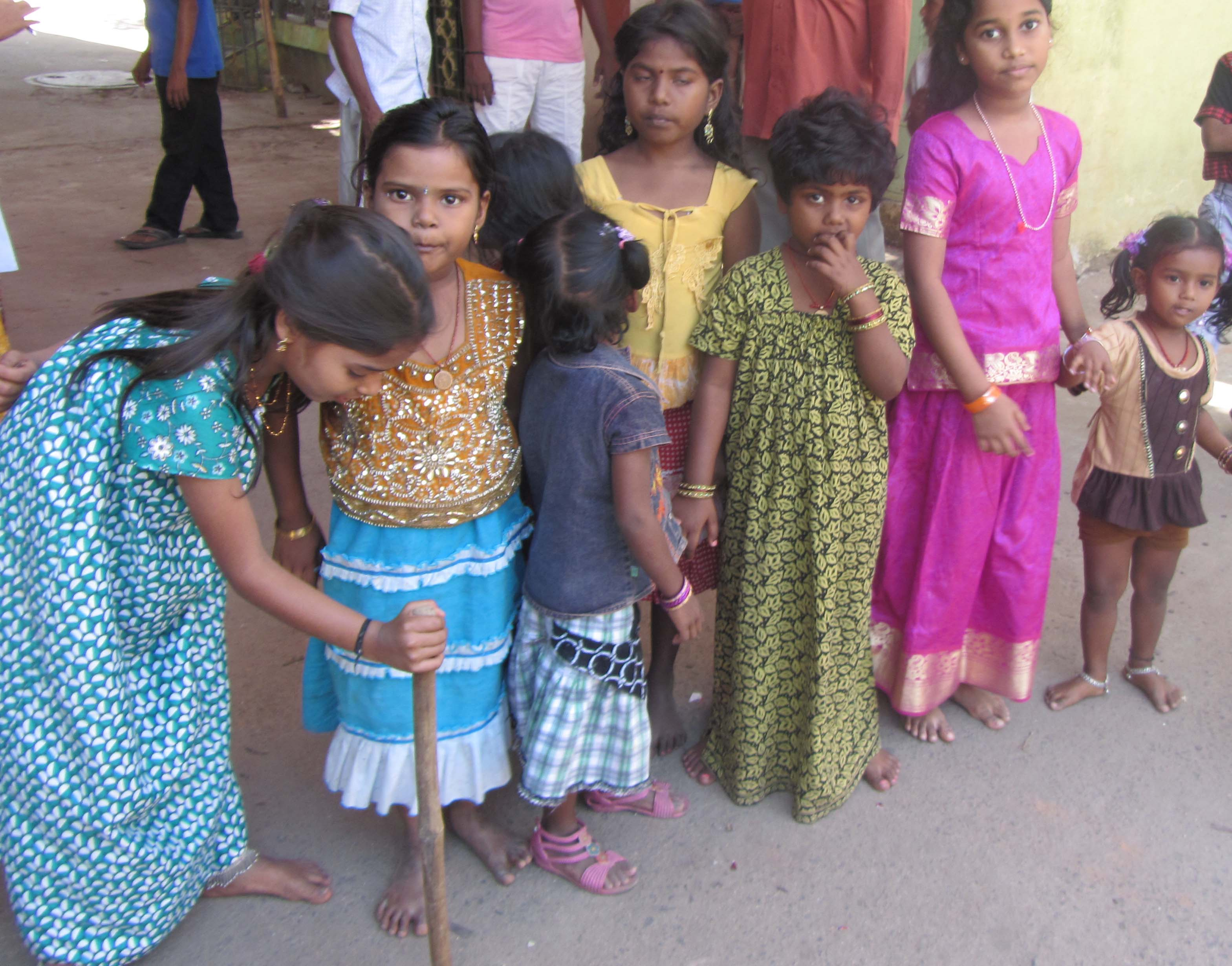 கிழவி விளையாட்டு. உரையாடி நடித்தல்